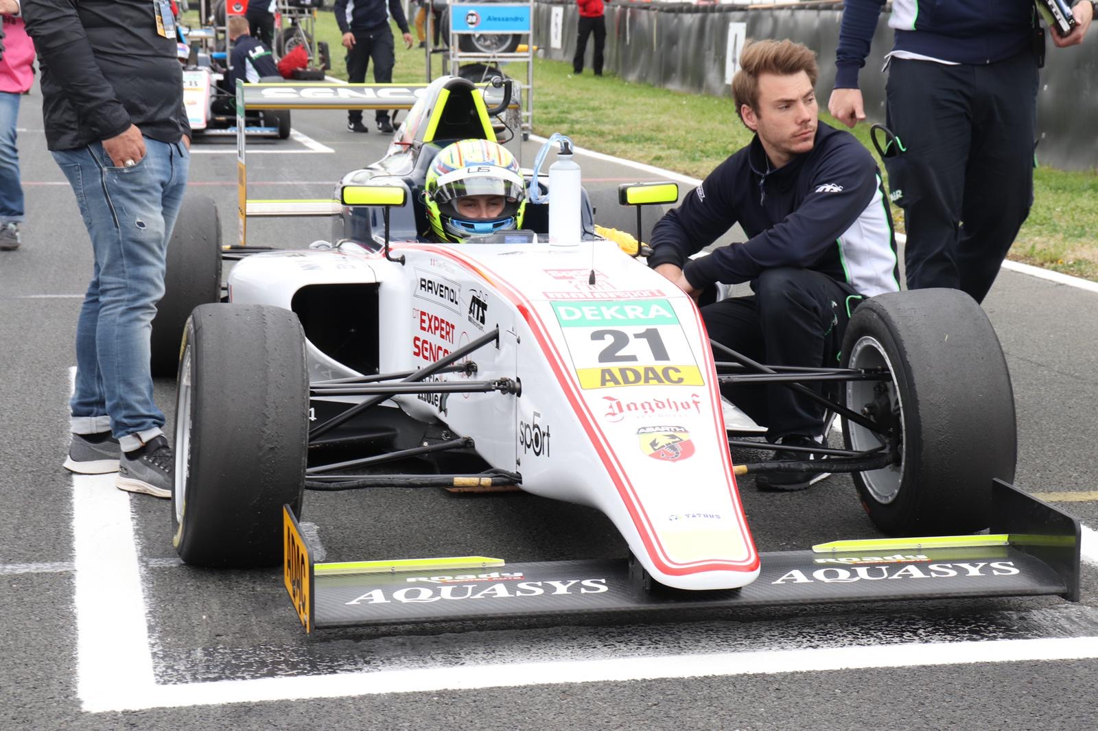 Théo Pourchaire, sur la grille de départ d'une manche de championnat d'Allemagne de Formule 4 en 2019 à Oschersleben.